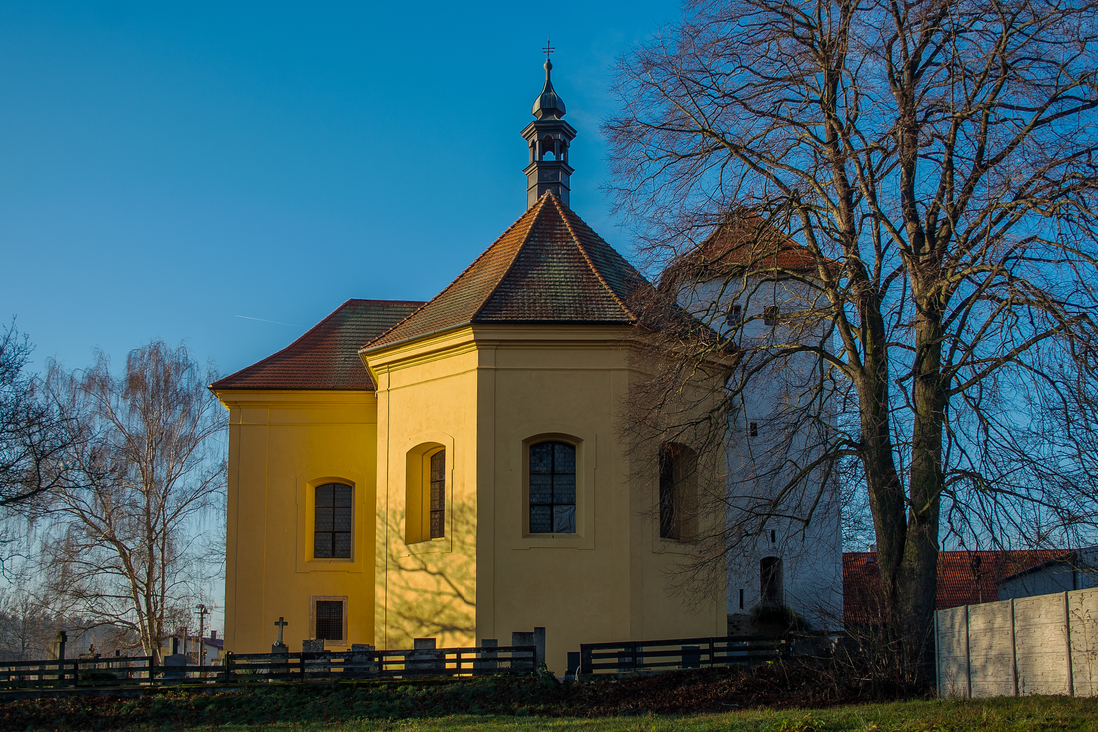 Presbytář kostela v Seči u Blovic